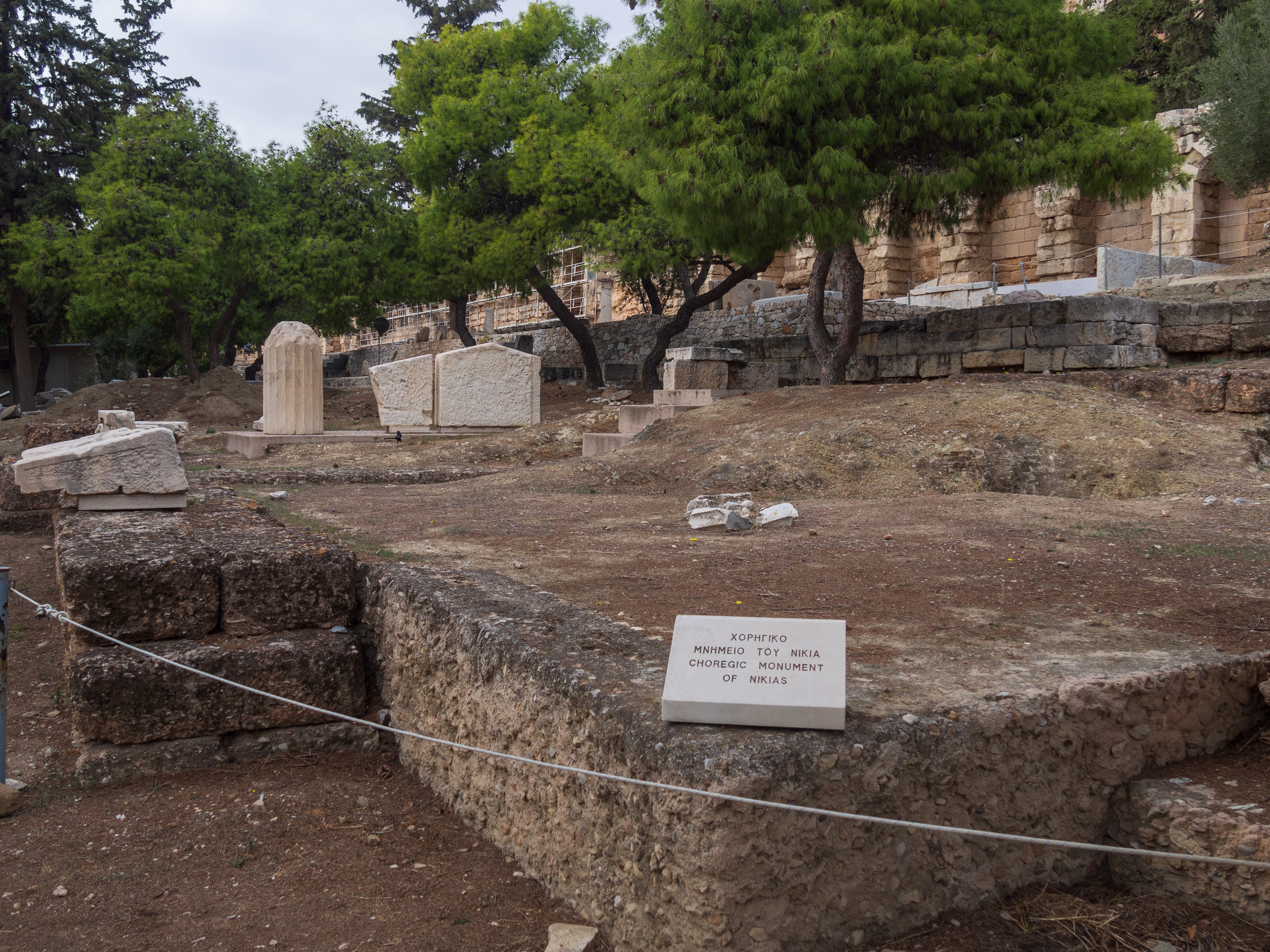 Νότια Κλιτύς Ακροπόλεως Αθηνών«Νότια Κλιτύς Ακροπόλεως Αθηνών»